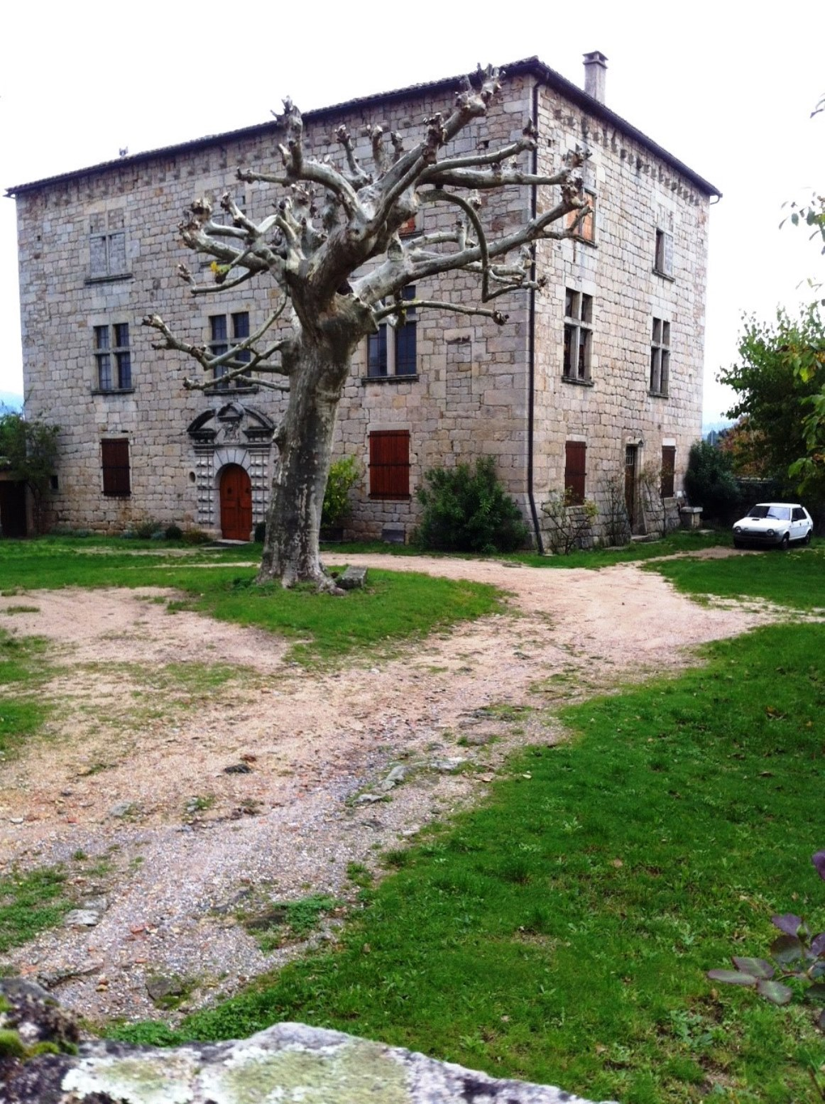 Était la propriété des comtes de la Saumés (famille de Chanaleilles) situé a Lablachere (Ardeche)